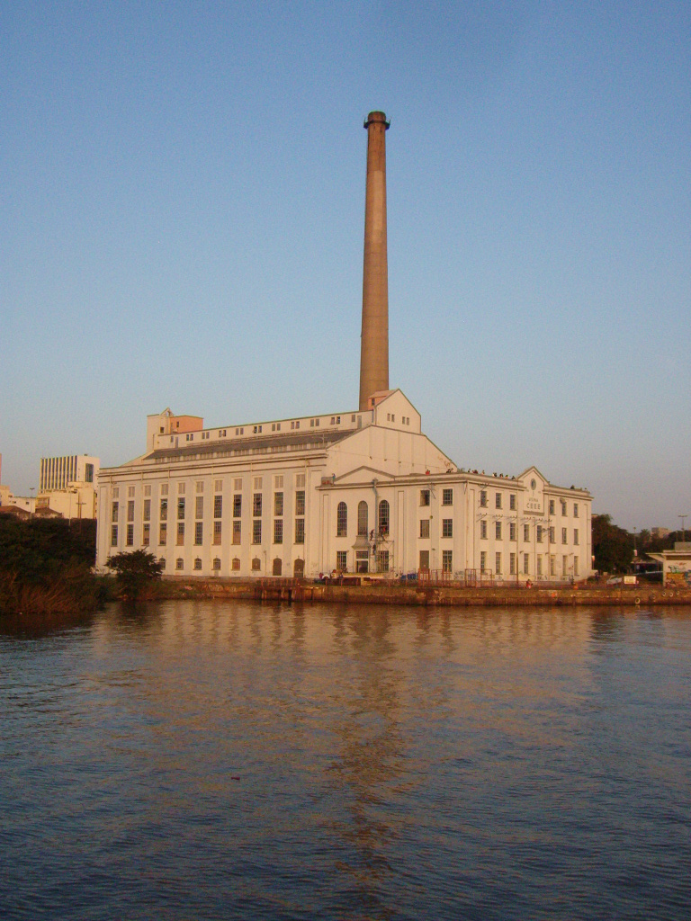 Gasômetro visto do guaíba